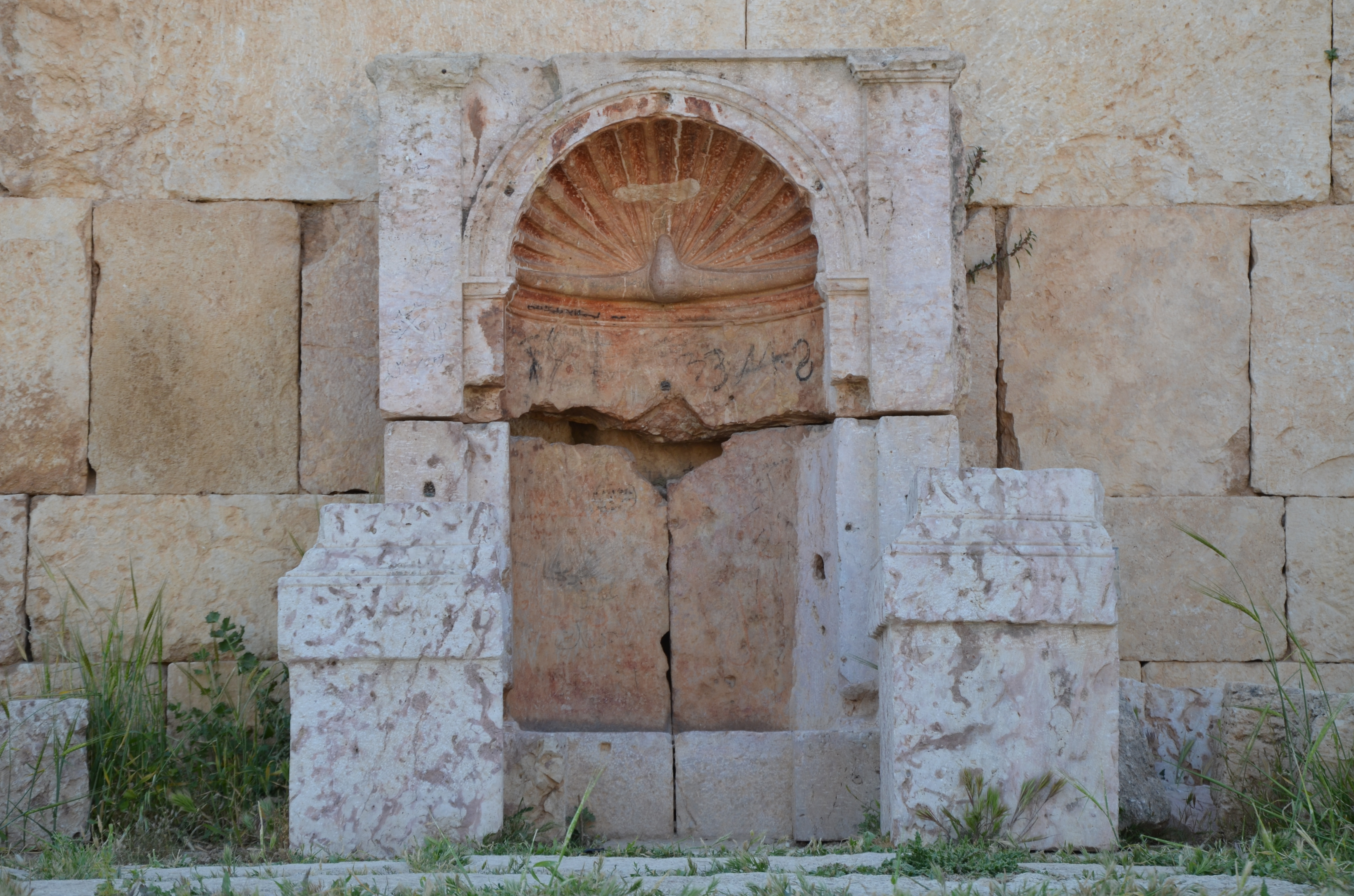 Gerasa, Jordan